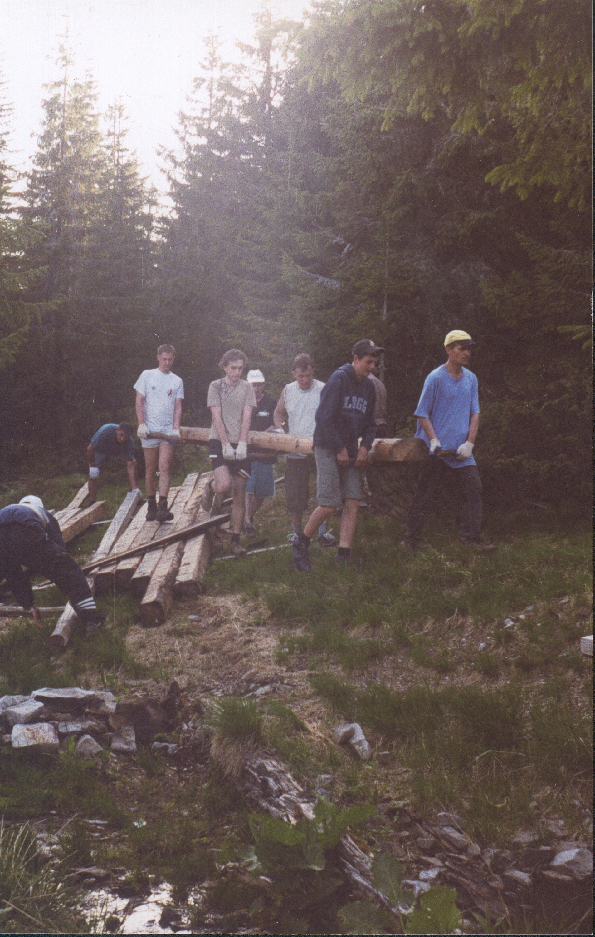 Акція 28 травня, волонтери переносять конструкції